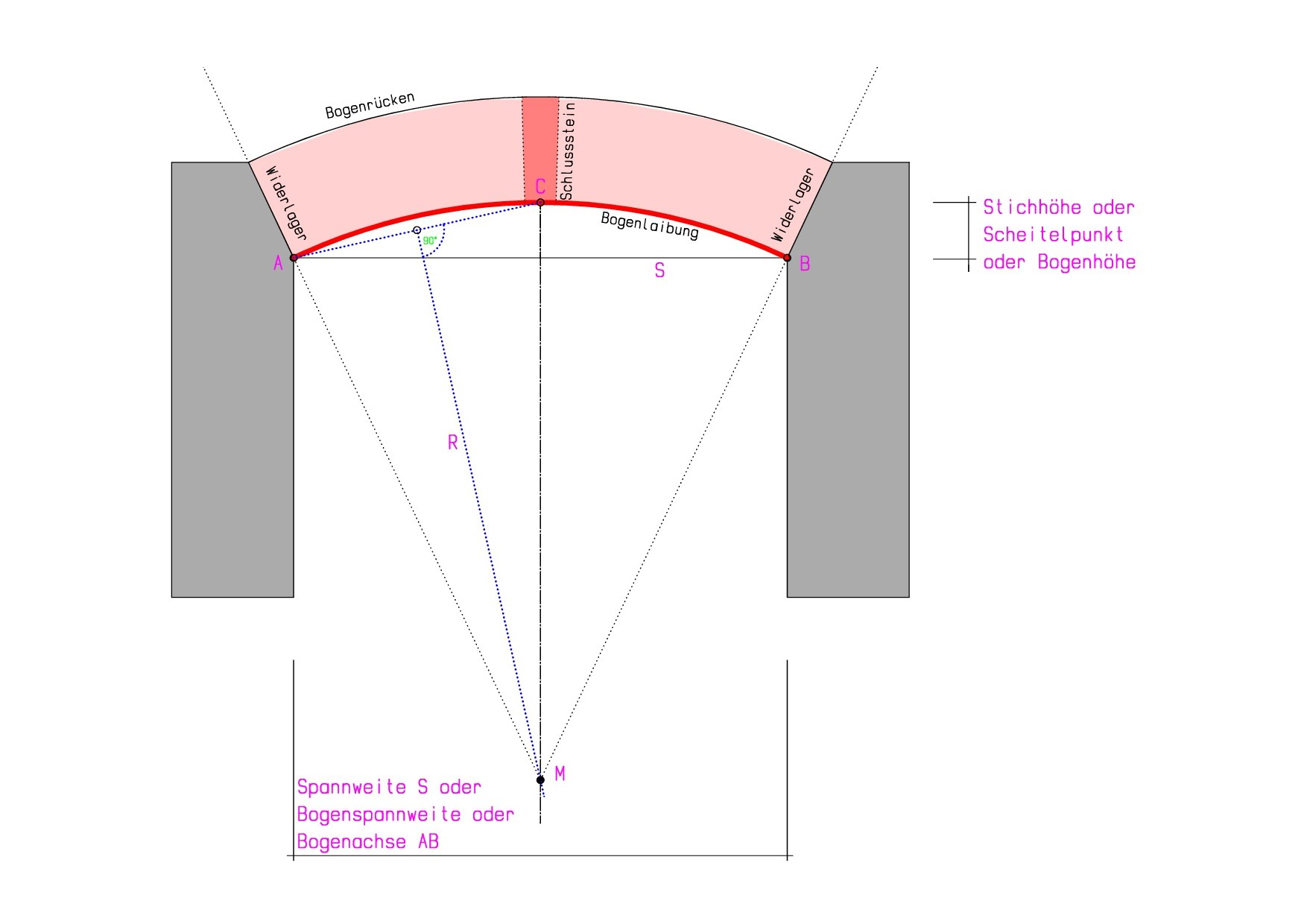 Der Segmentbogen wird auch Stich- oder Flachbogen genannt. Die Stichhöhe sollte sich zwischen 1/6 und 1/12 der Spannweite bewegen. Dieser Bogen erzeugt durch seine geringe Stichhöhe viel größere Schubkräfte als der Rundbogen. Im Vergleich zum Rundbogen ist der Segmentbogen auch wesentlich weniger gekrümmt. Dadurch ergeben sich am Bogenrücken geringere Fugendicken. Diese sollten kleiner als 2 cm sein. Der Bogenmittelpunkt wird über Mittelsenkrechte auf die Bogensehnen erzeugt. Quelle